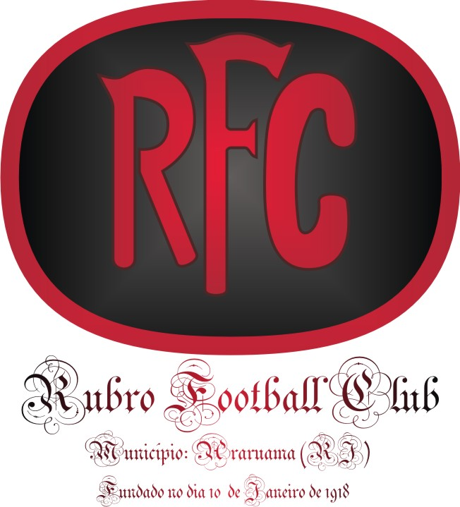 Logo (1918): Rubro Football Club, Araruama (RJ), Brazil.